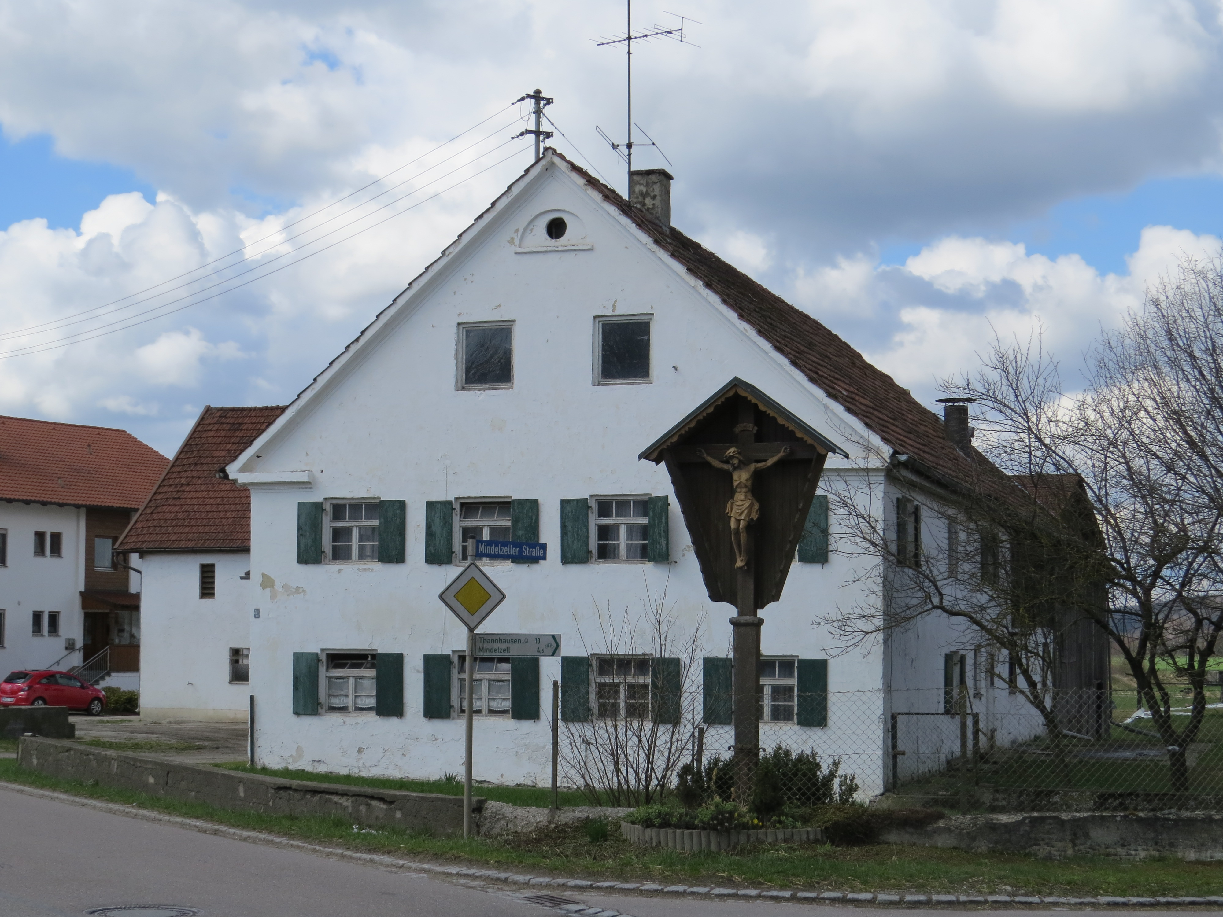 Derndorfer Str. 16 in Tiefenried, Kirchheim (Schwaben)